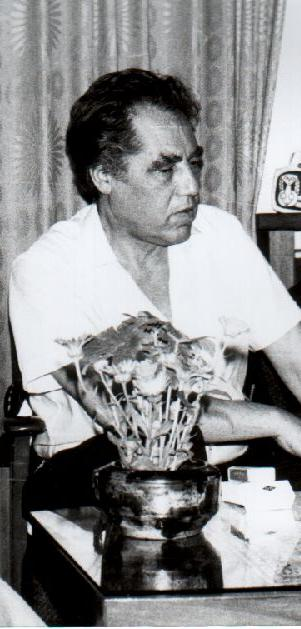 Георги Джагаров, български поет и политик